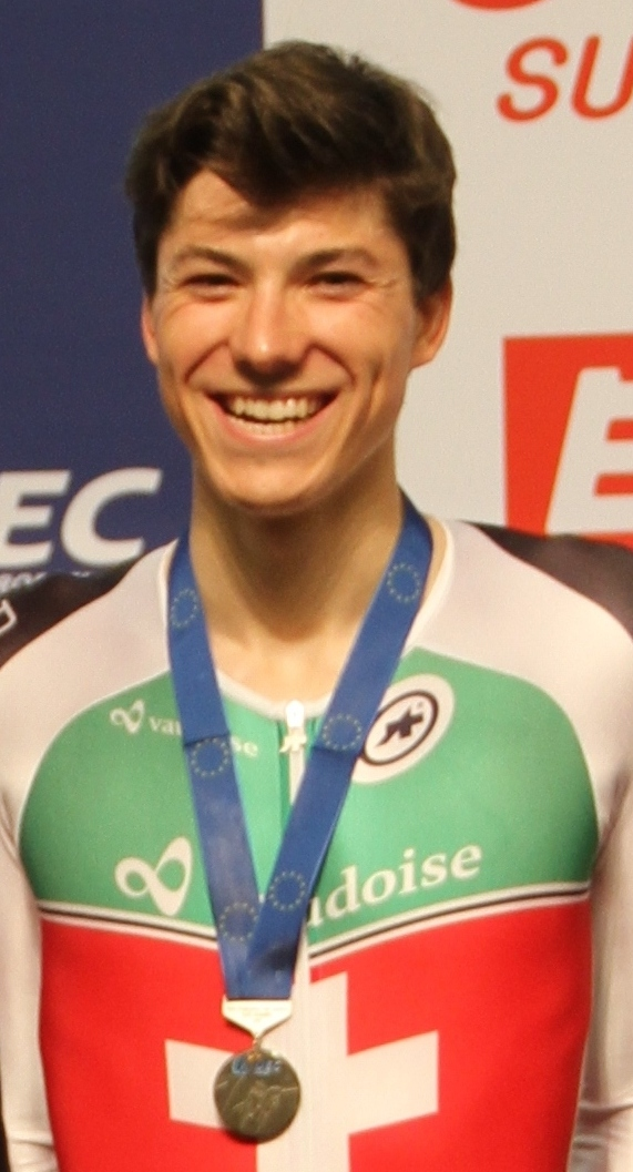 The making of this document was supported by the Community-Budget of Wikimedia Germany. Frank Pasche, Schweizer Radsportler